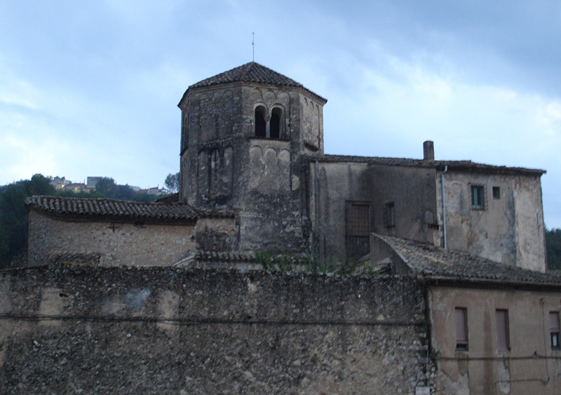 Monestir de Sant Daniel (Girona, Catalunya, Espanya)